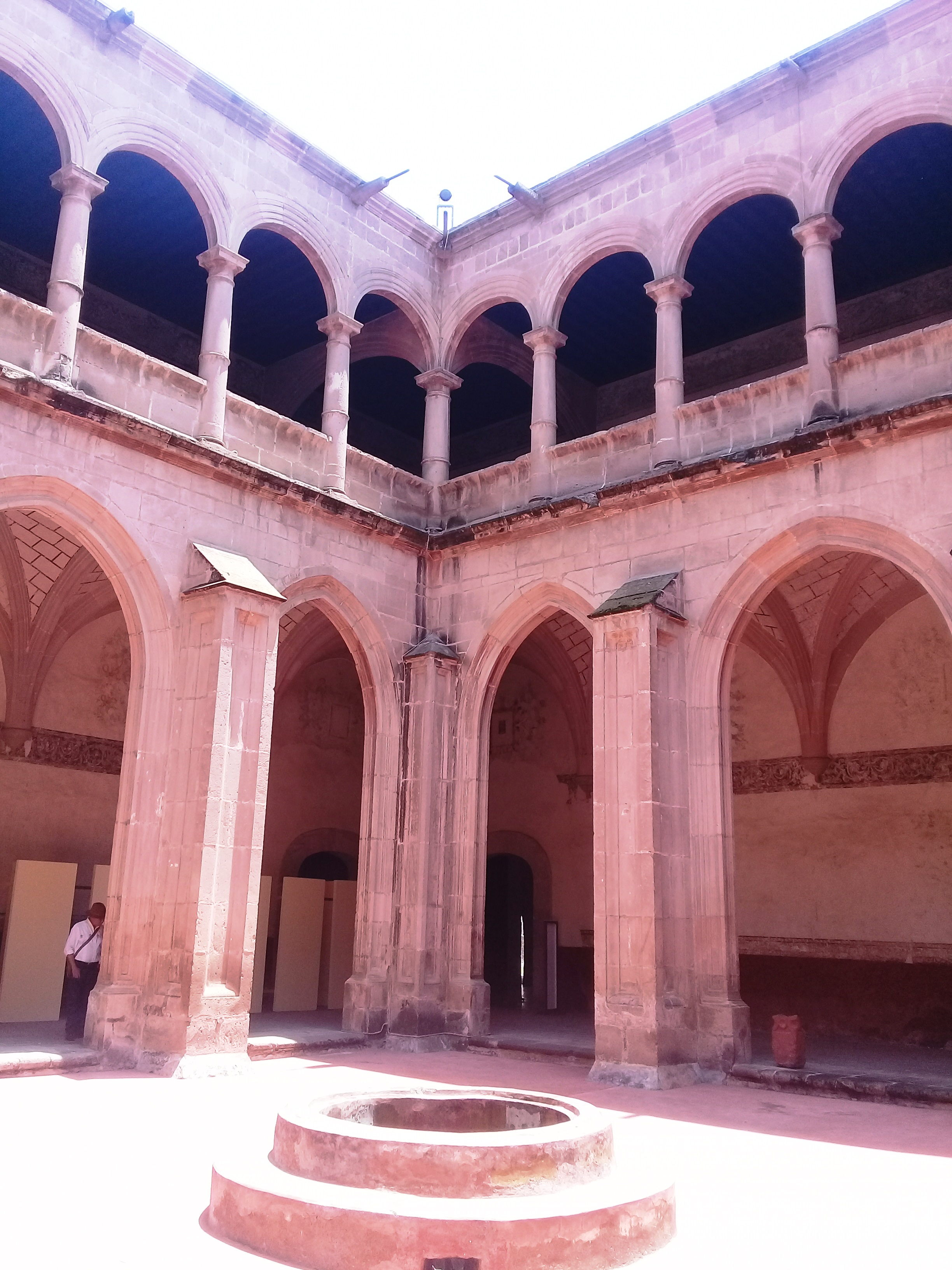 Templo y exconvento de San Nicolás de Tolentino (Actopan).